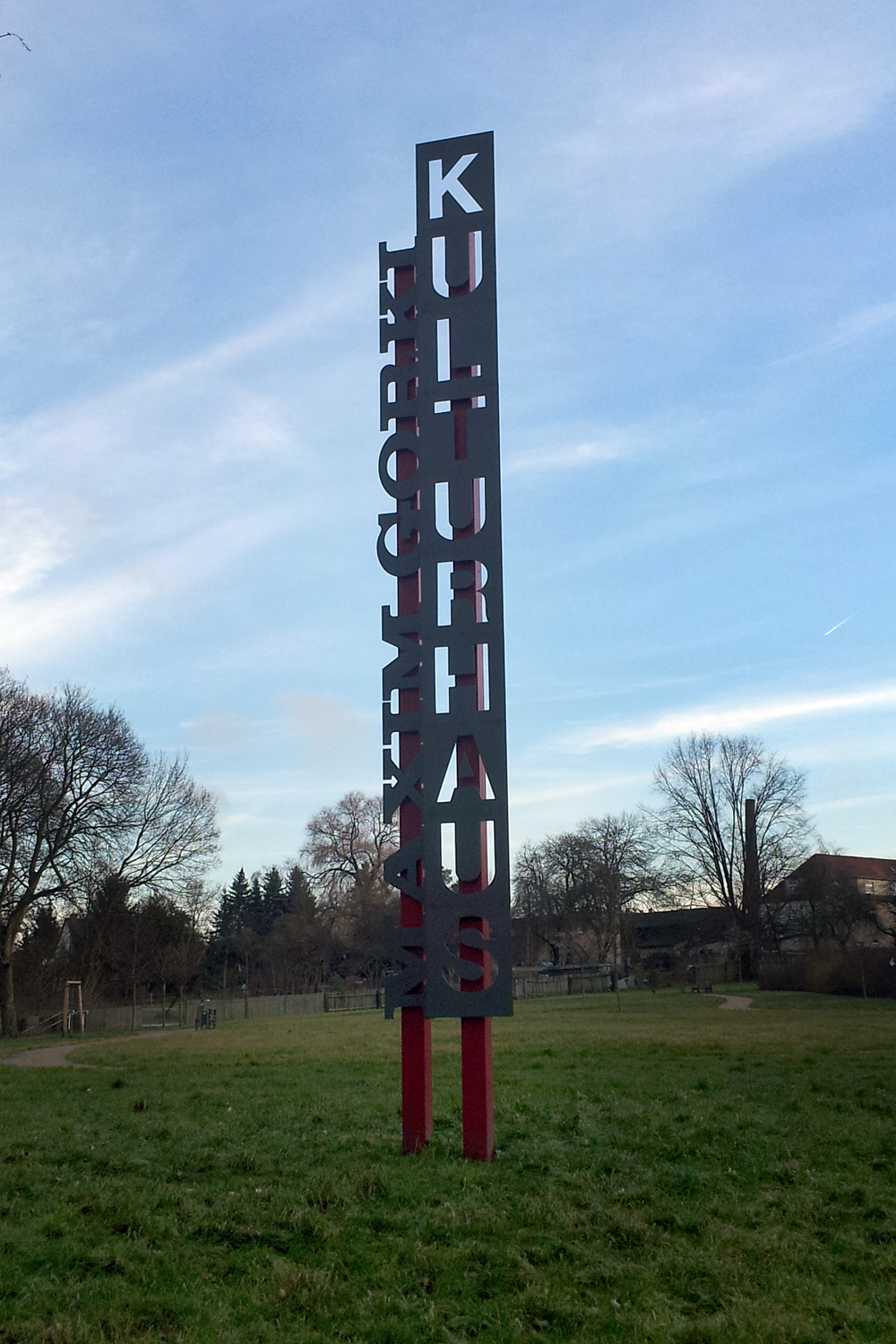 Gedenkstele für das ehemalige Kulturhaus "Maxim Gorki" in Radeberg